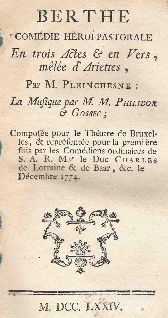 Berthe (Bruxelles 1774)